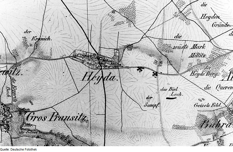 Original image description from the Deutsche Fotothek Hirschstein-Heyda. Oberreit, Sect. Oschatz, 1839/40